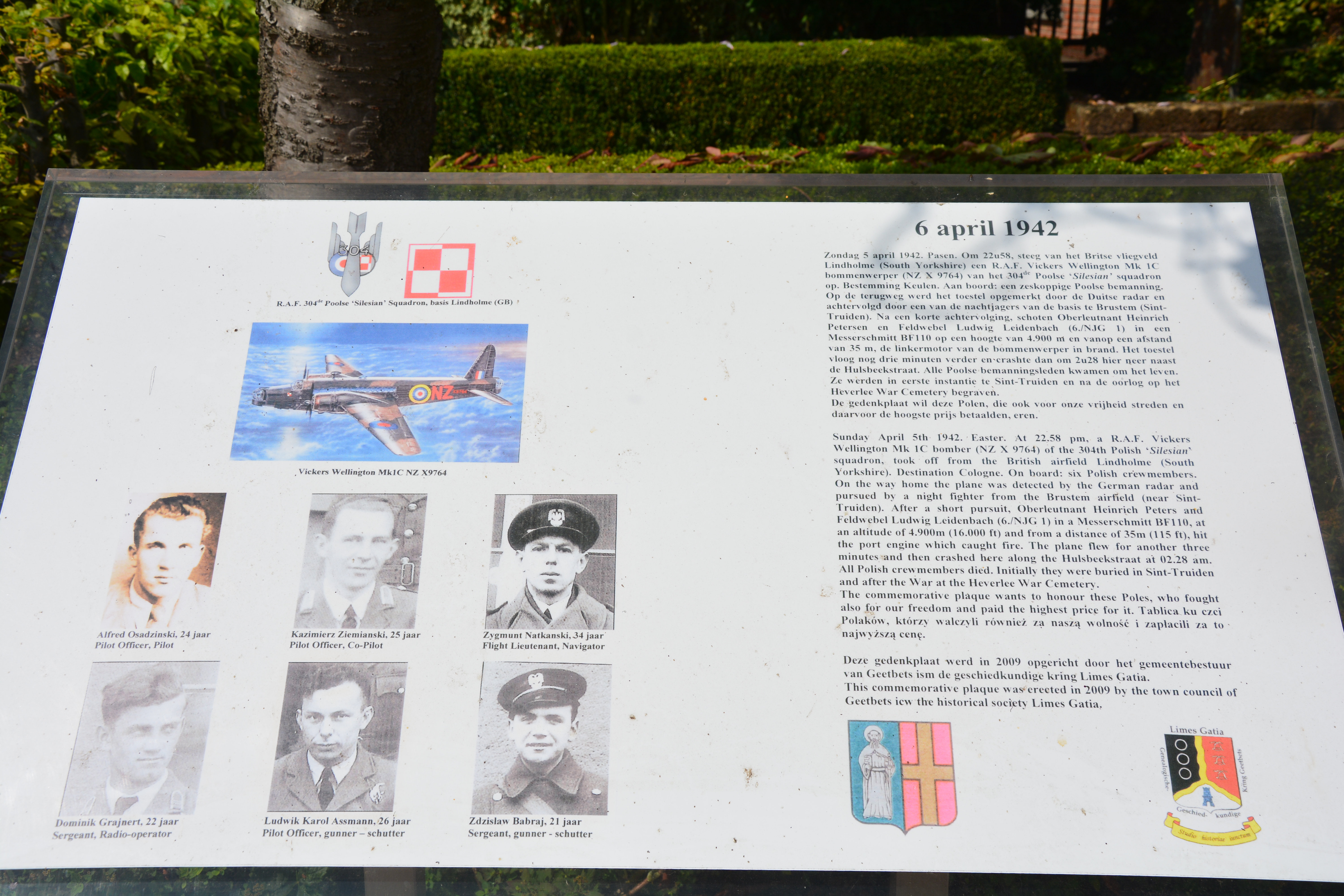 bord ter nagedachtenis van R.A.F. 304de Poolse 'Selesian' Squandron, basis Lindholme (GB)